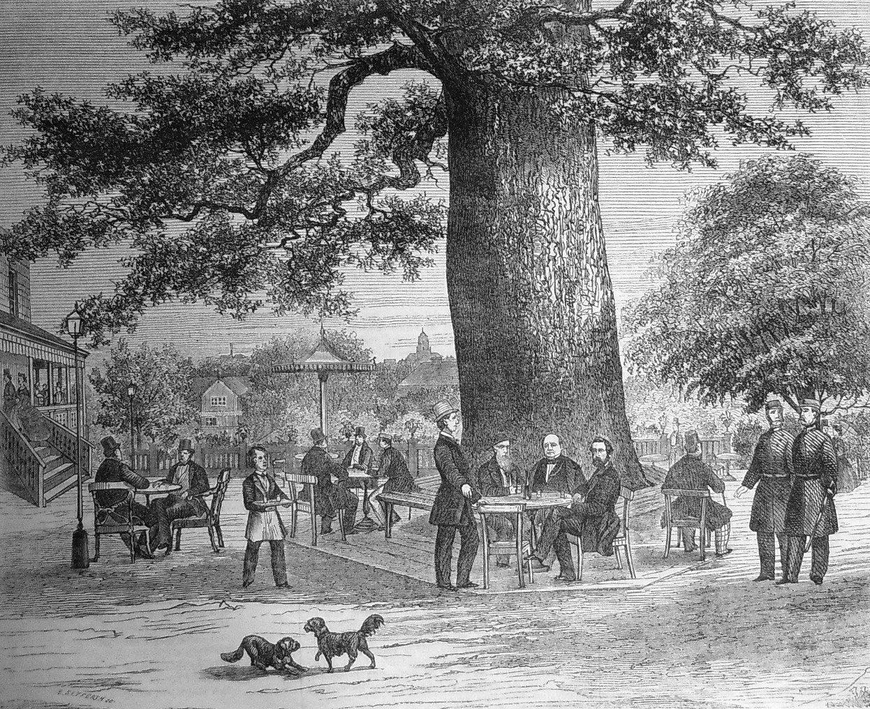 Bellmanseken på Hasselbacken. Originalteckning av J. F. Meyer. Litografi i Illustrerad Tidning, nr 36 den 9 september 1865.